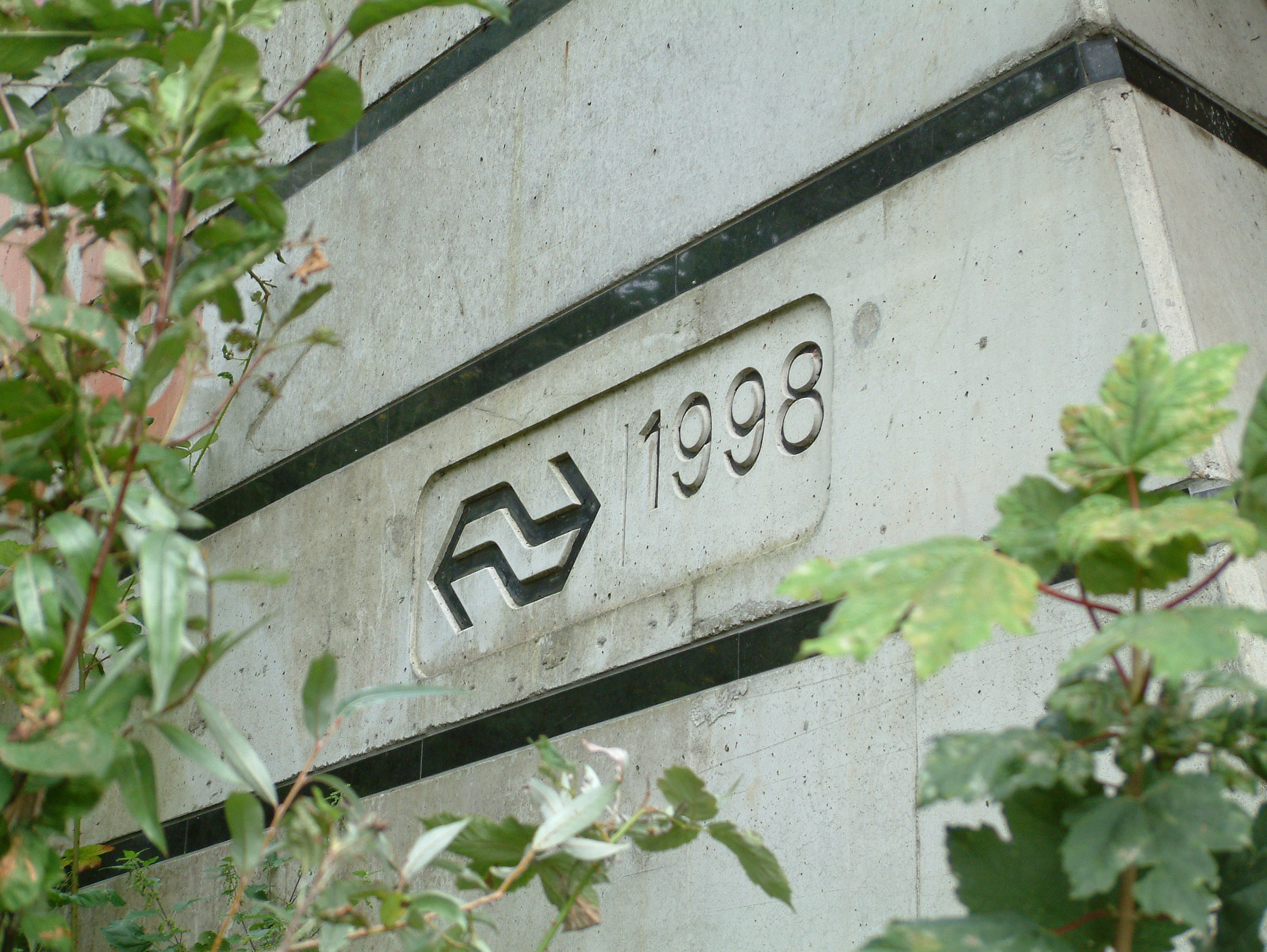 Bouwjaar van de spoorbrug naast de A20 over de Rotte